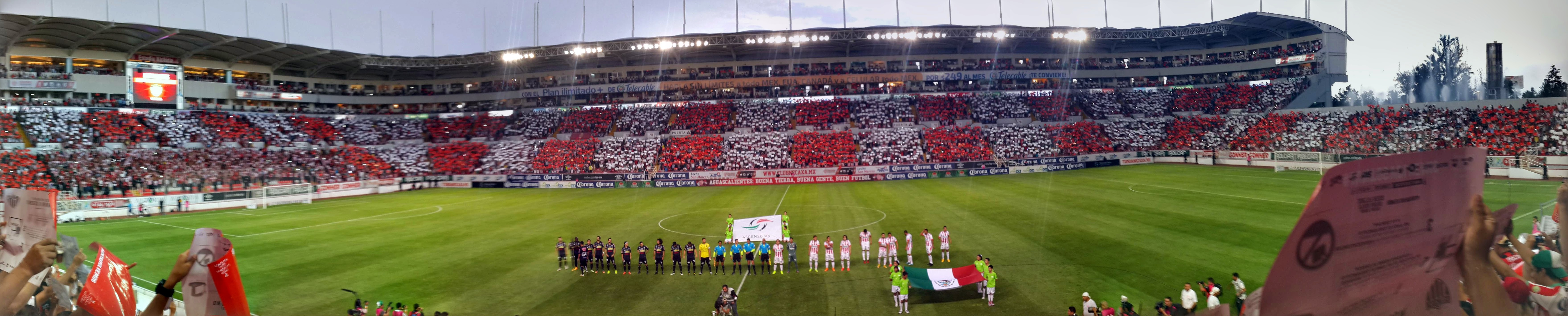 Estadio Victoria durante la final de ascenso 2014-2015.